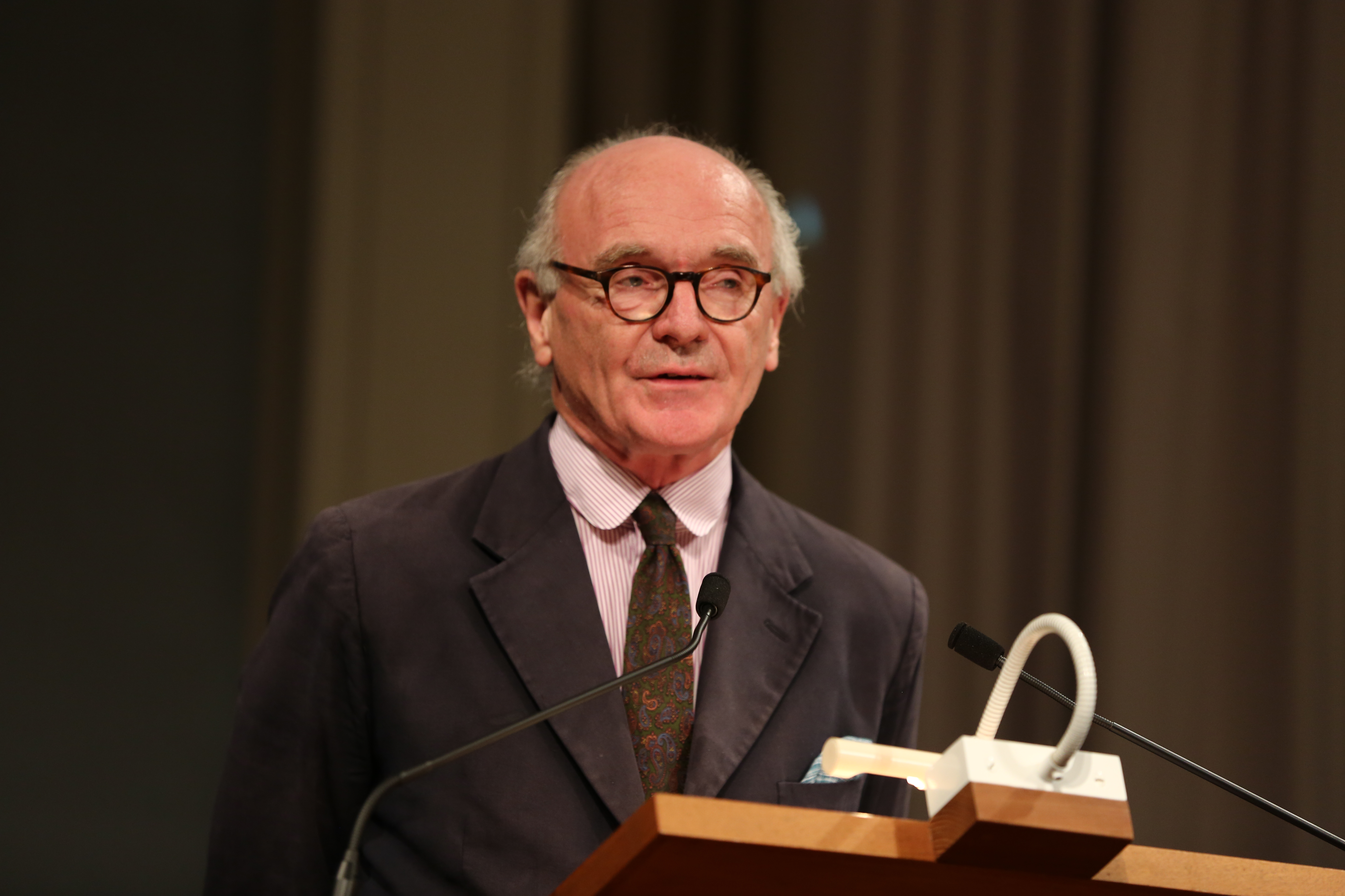 Martin Mosebach, Juror des Thomas-Mann-Preises und Laudator Verleihung des Thomas-Mann-Preis_2017 der Hansestadt Lübeck und der Bayerischen Akademie der Schönen Künste an Brigitte Kronauer. 18. Oktober 2017 in der Münchner Residenz.